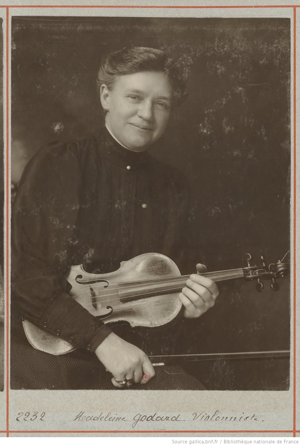 Madeleine Godard violoniste (1860-1940), photographie Atelier Nadar source BNF/gallica